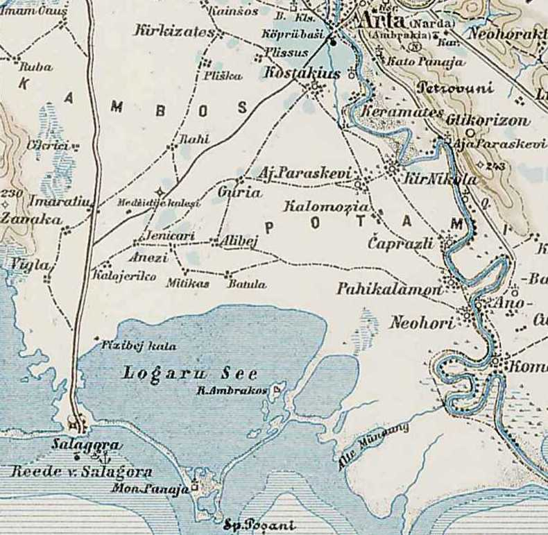 Τμήμα του κάμπου της Άρτας από Αυστριακό χάρτη του 1887.